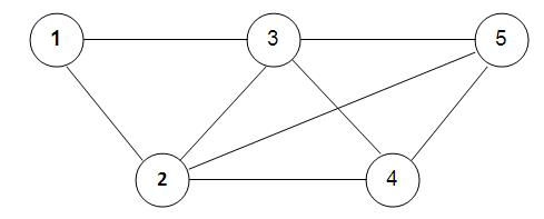 şebeke modeli örneği